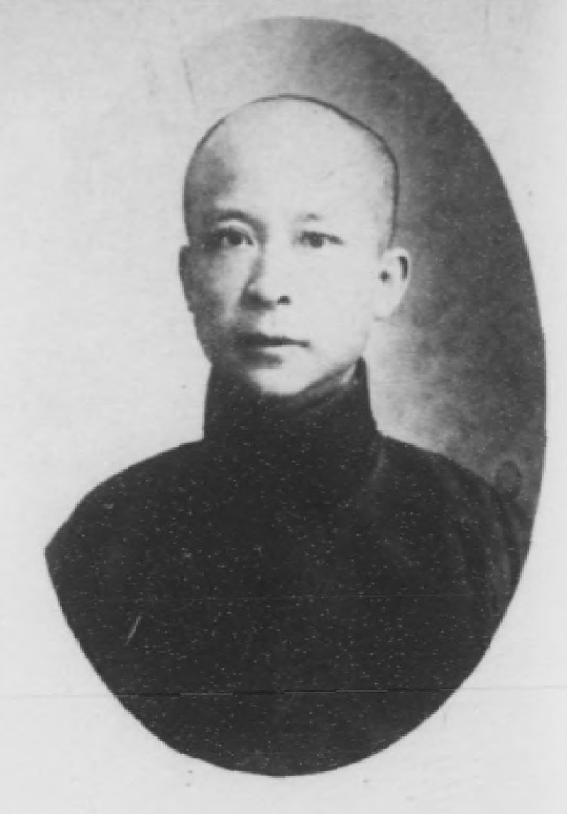 光緒甲辰科進士小像